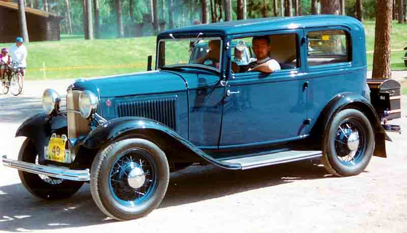 Ford Model B 55 Standard Tudor Sedan 1932